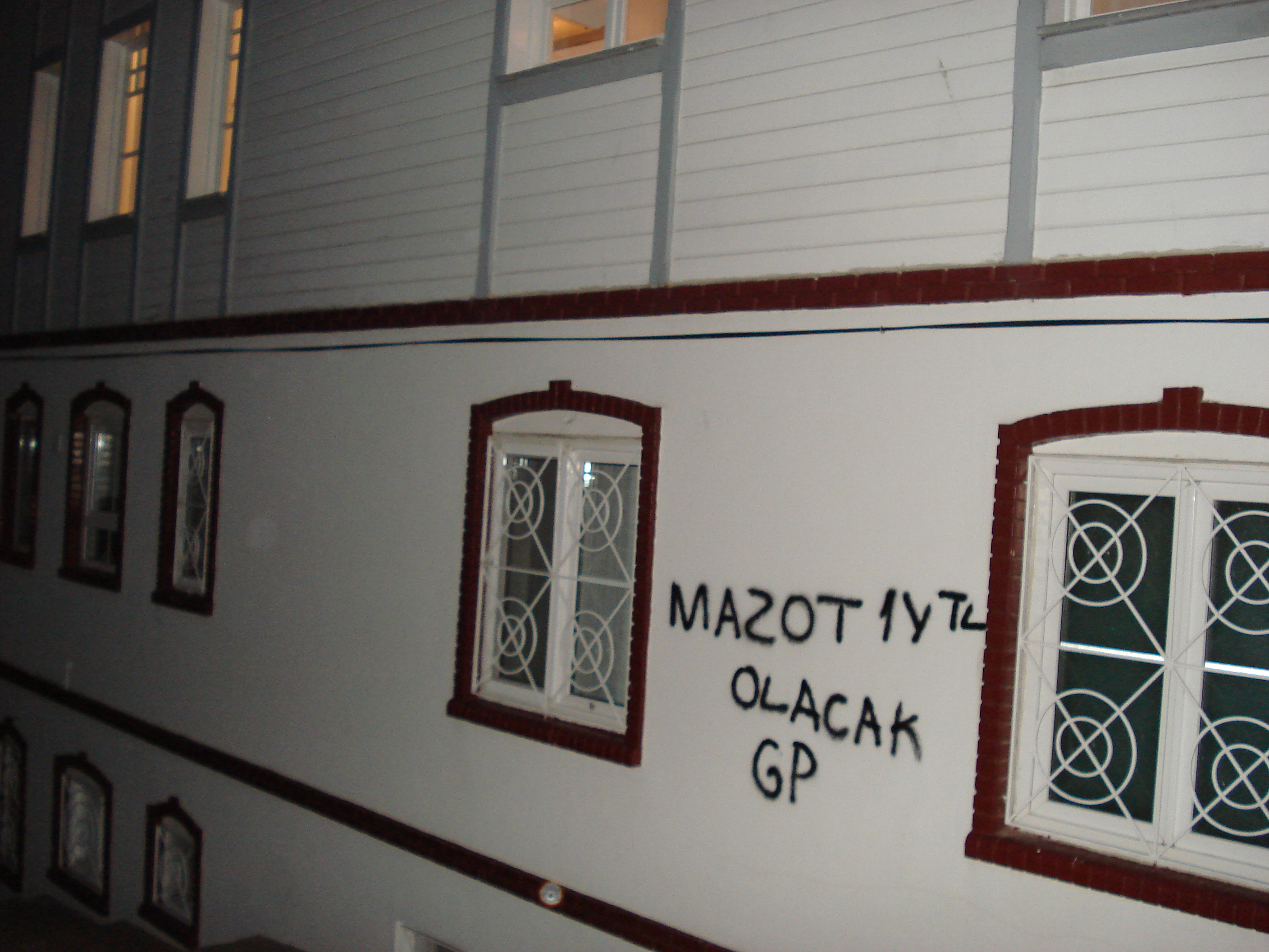 Genç Parti'nin seçmenlere 2007 Türkiye Cumhuriyeti Milletvekili Genel Seçimleri için bulunduğu vaatlerden biri olan "Mazot 1 YTL olacak" bir eve sprey boyayla tekrar belirtilmiş (Kınalıada).